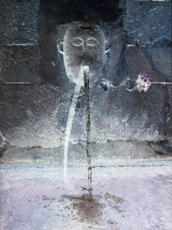 Caño de agua de la fuente de la Breña en Talaván (Cáceres)